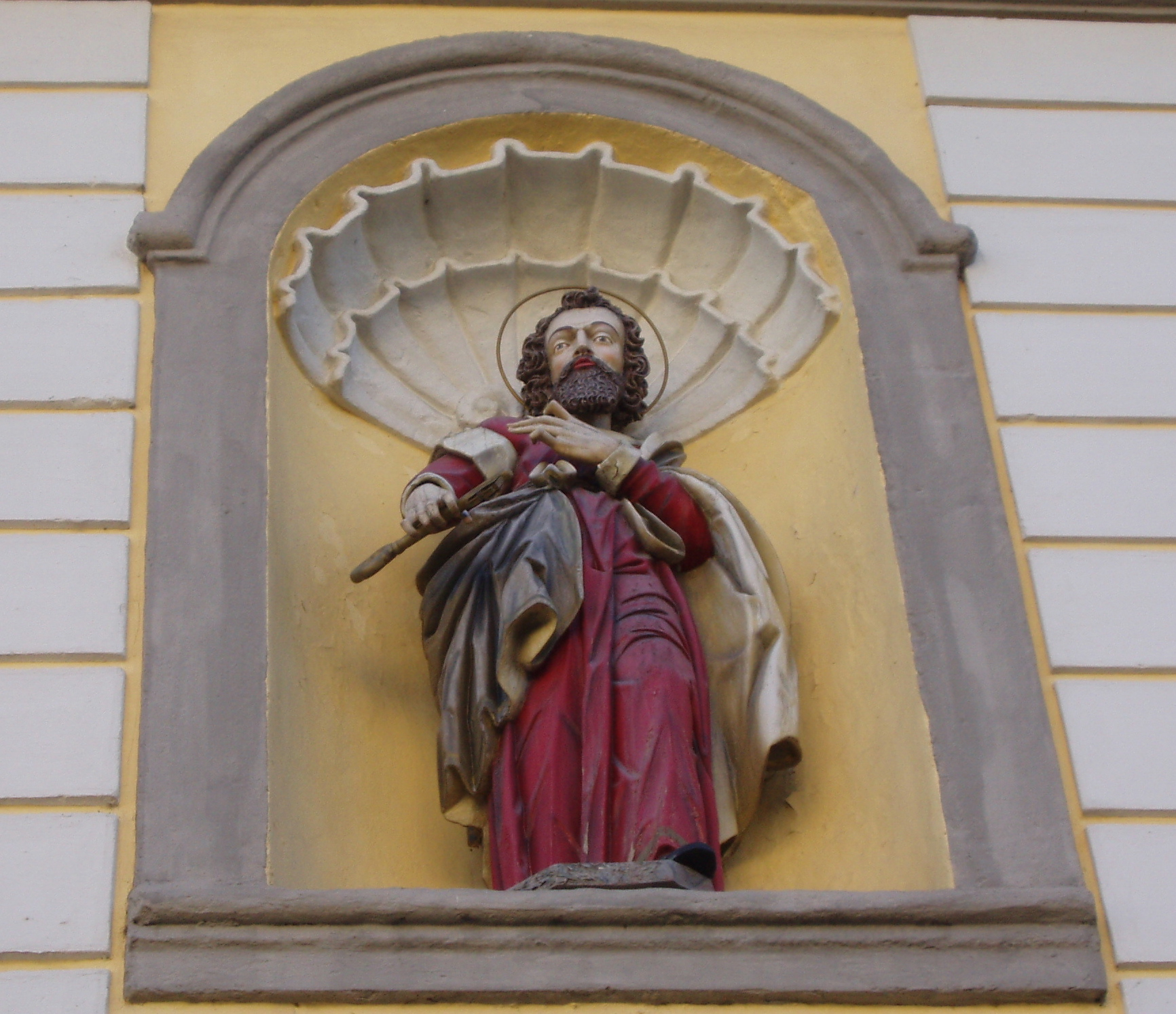 Herriedener Pfarrhauses, Petrus-Statue